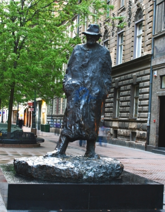 spomenik Tinu Ujeviću podignut darovnicom Antuna Števinovića 1991. godine u Zagrebu